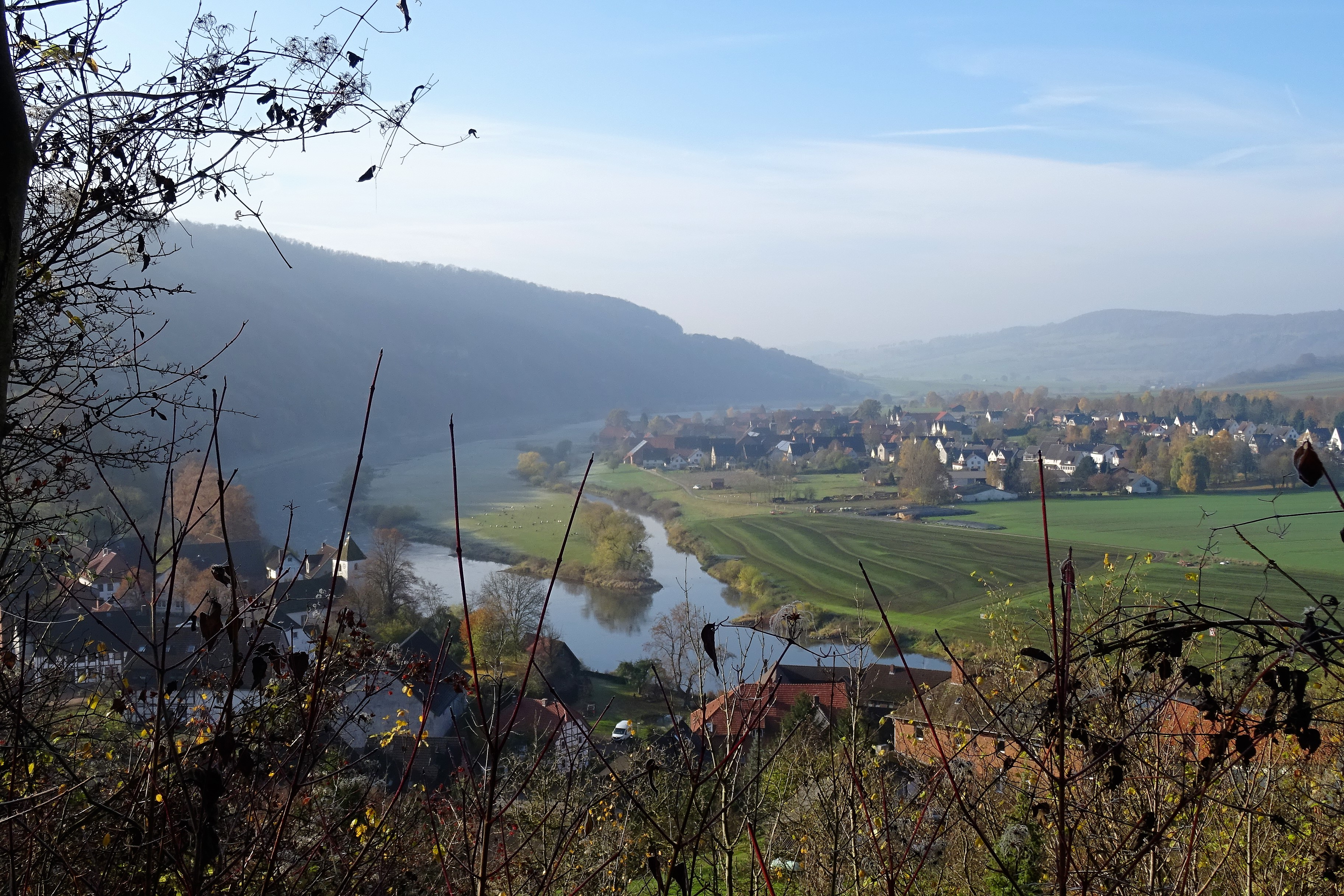 Blick vom Weinberg bei Rühle (NSG HA 107) über Rühle, die Weser und Pegestorf; links der Bergrücken Breitestein; abgebildete Landschaftsbereiche teilweise im EU-Vogelschutzgebiet DE-4022-431 „Sollingvorland“